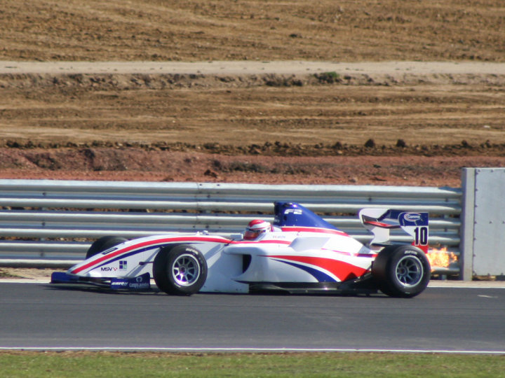 La monoplace de Benjamin Lariche